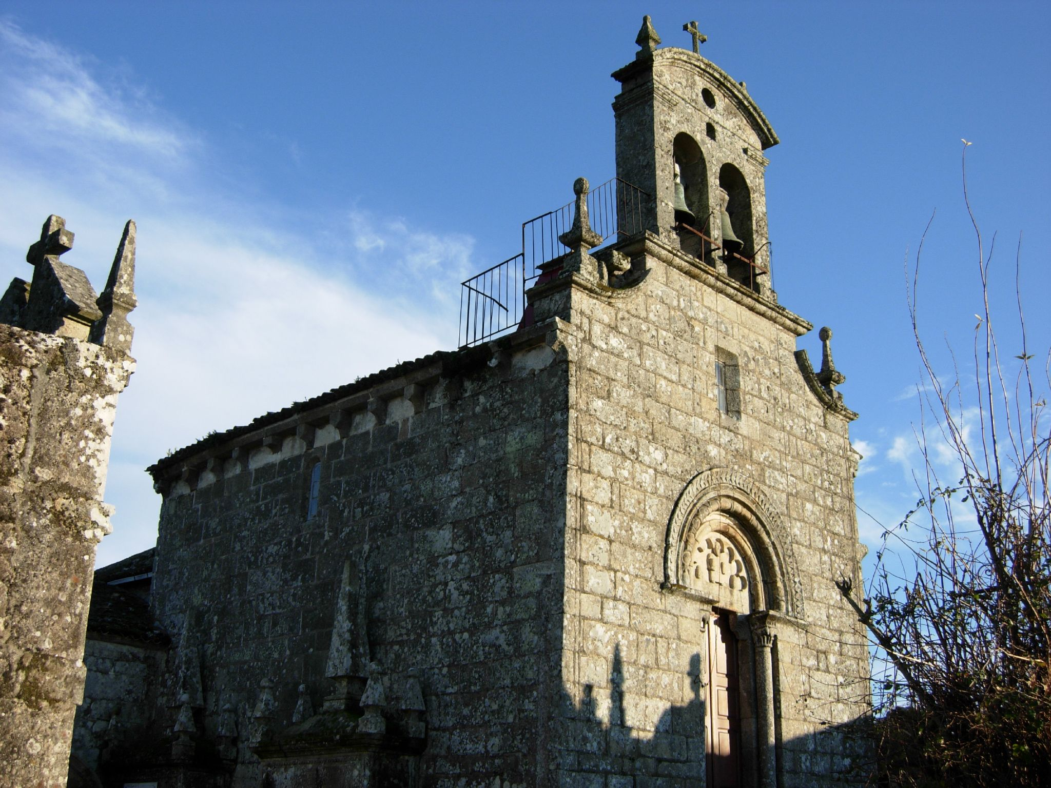 Iglesia románica construida en el siglo XIII. De pequeñas dimensiones, tiene planta de nave única y ábside rectangulares.